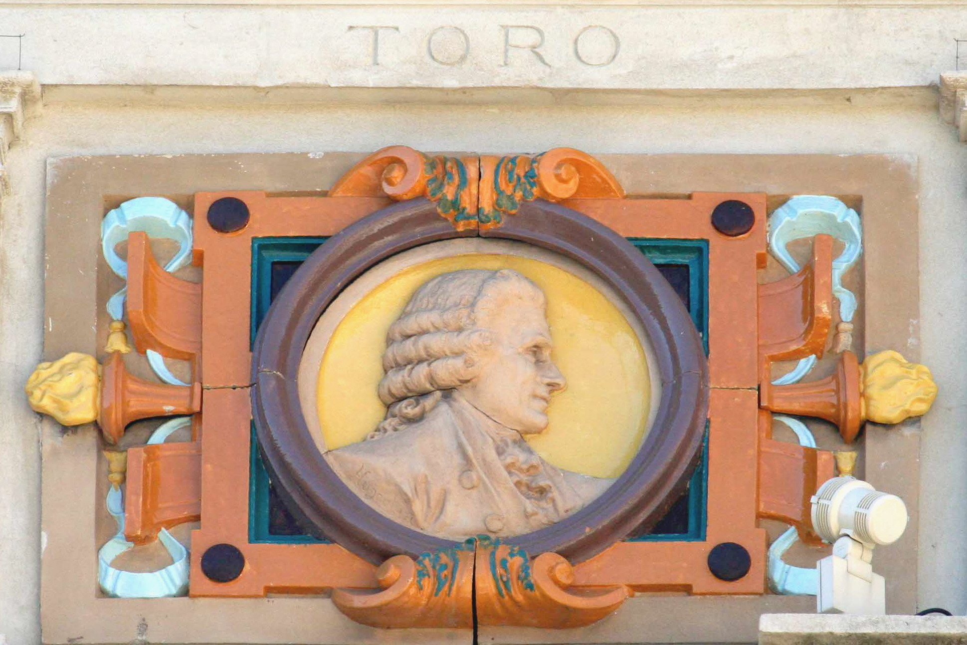 Médaillon de Bernard Turreau dit Toro sculpté par Hugoulin situé sur la façade de l'aile "Musée" du musée d'art de Toulon.